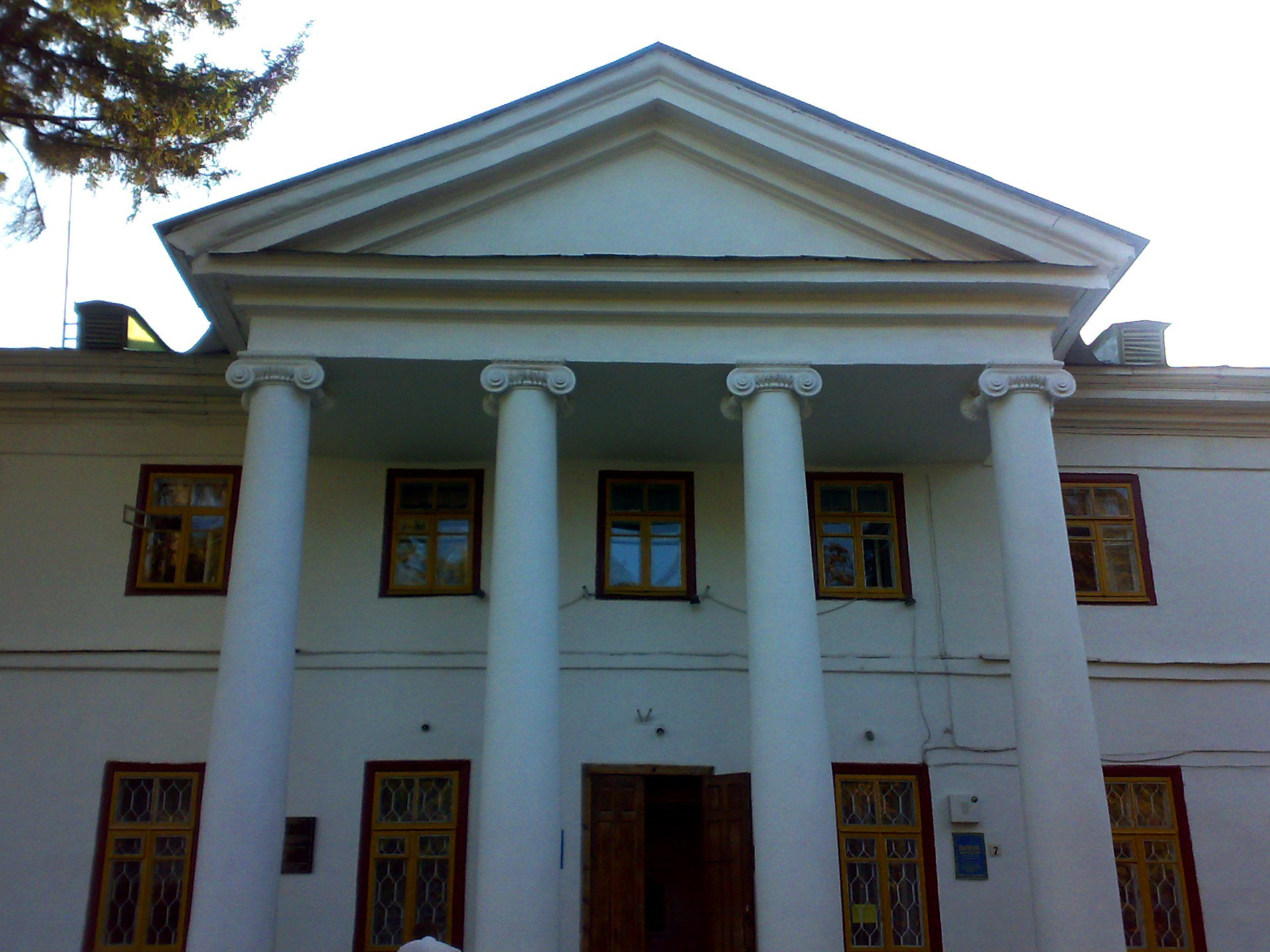 Фасад Зимового палацу (Біла Церква)